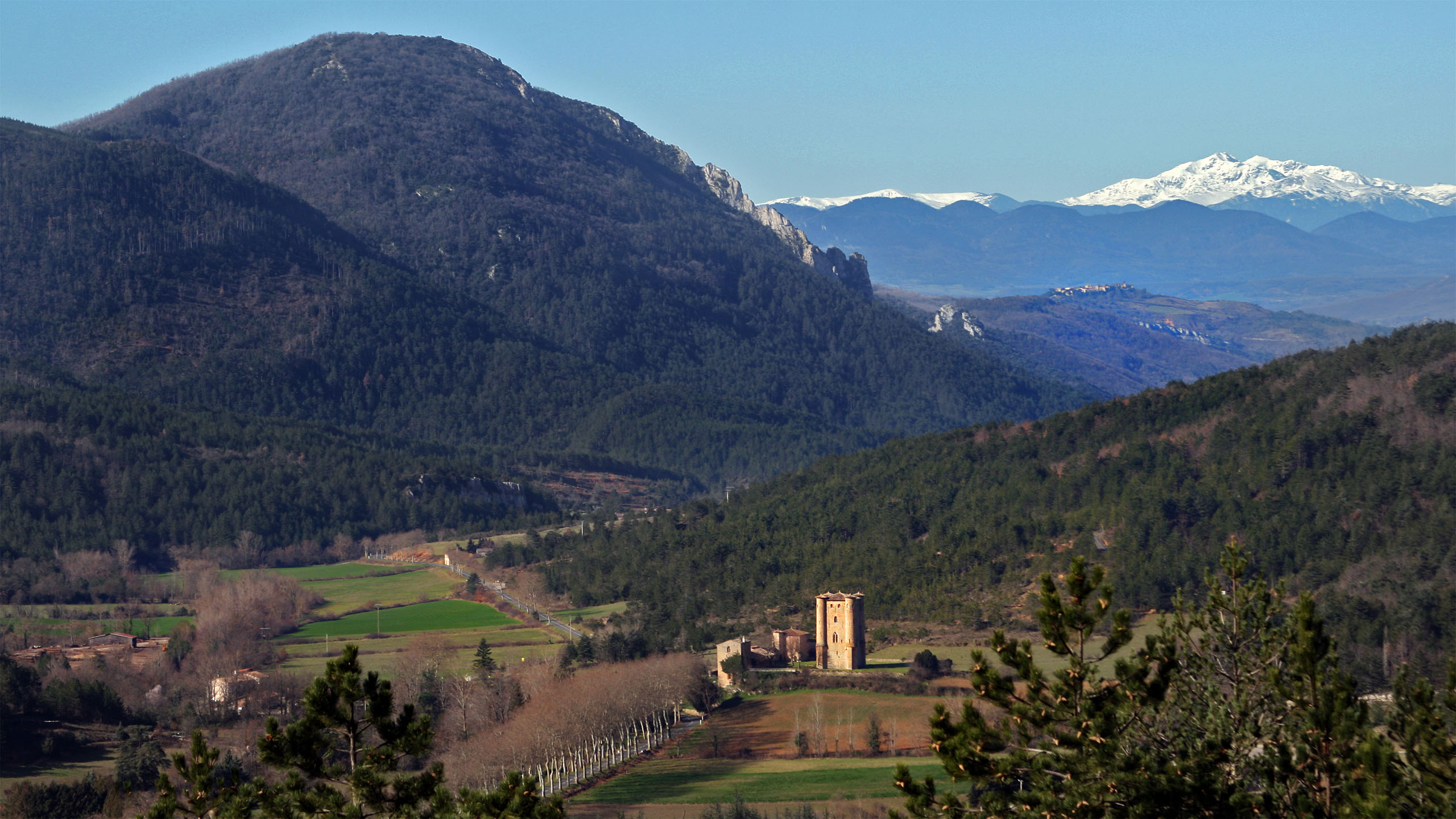 Chateau d'Arques vu de l'ouest